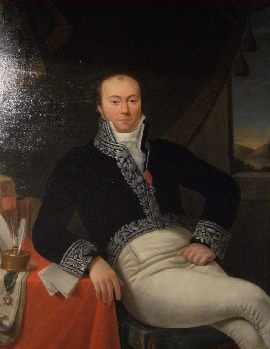 Le Baron de Stassart (1780-1854). Sous préfet à Orange en 1809, Préfet du Vaucluse, Président du Sénat en Belgique, poète et humaniste. Il fit don de sa riche bibliothèque à Orange et fonda la société d'agriculture, sciences et Art de l'arrondissement d'Orange.